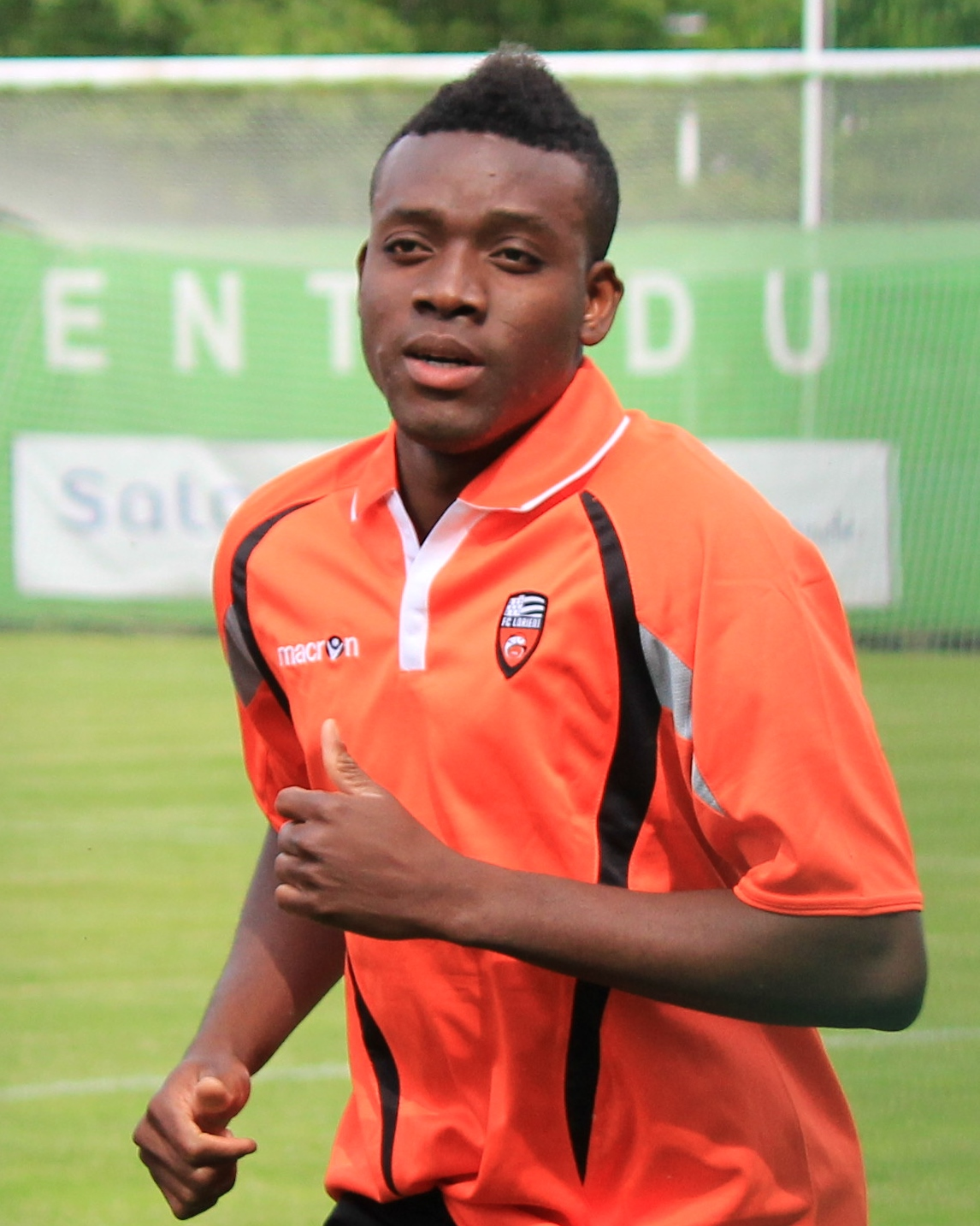 Alain Traoré lors de la reprise de l'entrainement du FC Lorient le 27 juin 2013